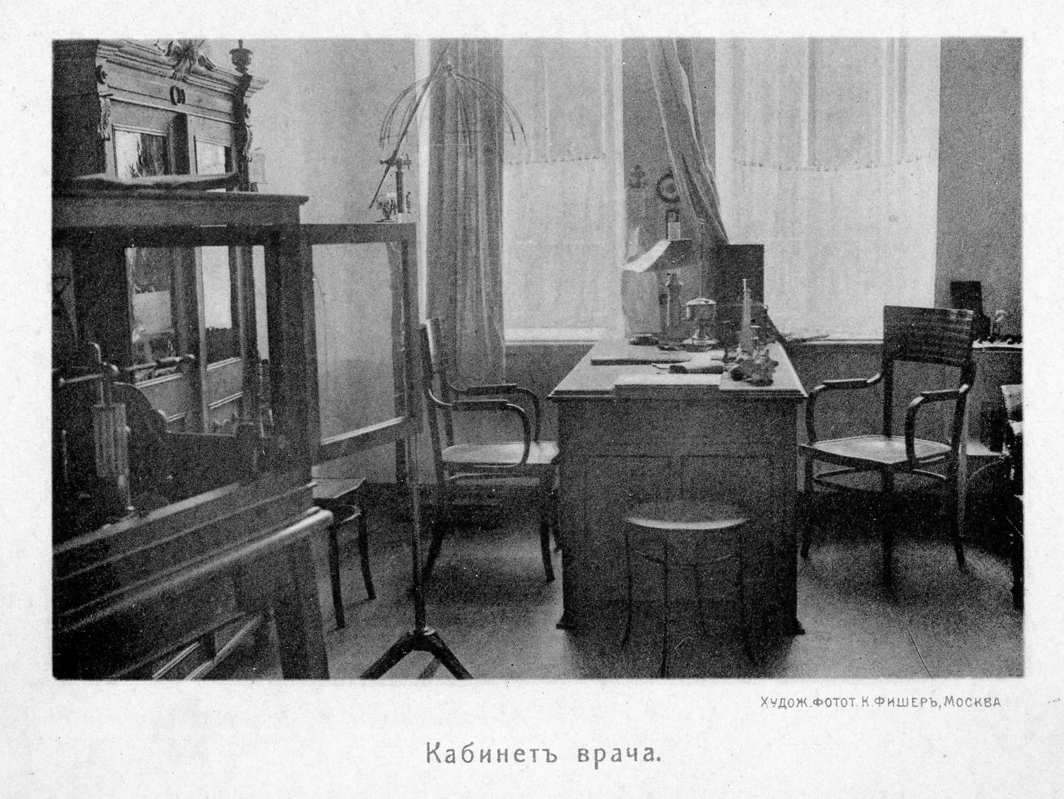 Кабинет врача санатория "Лесное", Ставрополь (ныне Тольятти)